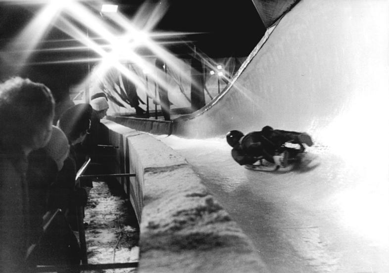 Oberhof, Rennschlittenbahn, Nachtfahrt ADN-ZB Kluge 5.1.1975-Bezirk Suhl: DDR-Meisterschaften im Rennschlittensport in Oberhof-Beim Nachtlauf am 4.1.1975 sorgten 255 blendfreie Quecksilber-Halogen-Leuchten für ausgezeichnete Sichtverhältnisse auf der 1 113, 11 Meter langen Oberhofer Kunsteisbahn.